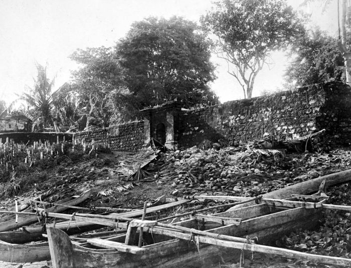 Repronegatief. Kano's liggen aan de muren van fortje "Hoorn", anno 1656 te Pelauw, Haruku